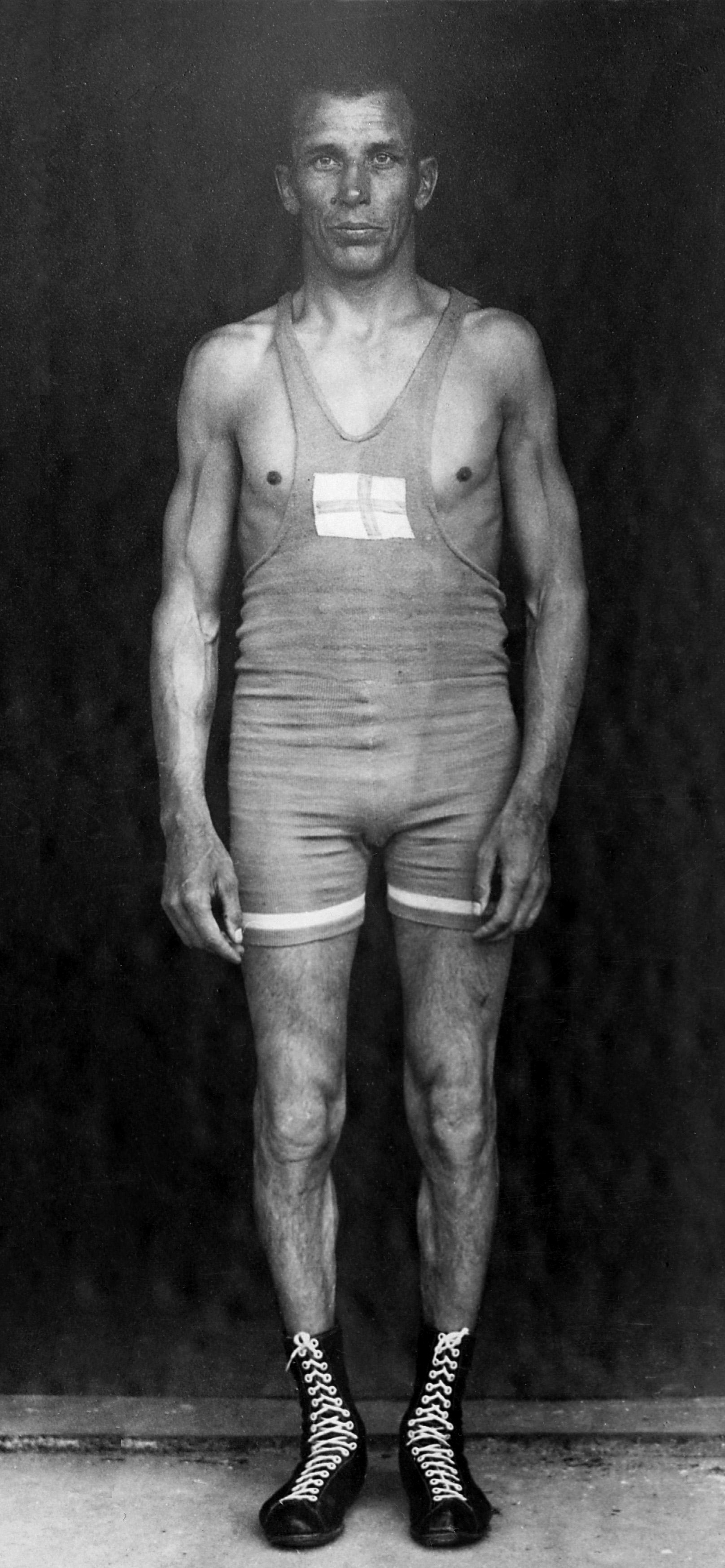 Sport, Olympische Spelen Amsterdam, 1928: Olympisch kampioen Kaarlo Edvin Makinen in de discipline worstelen, bantamgewicht tot 56 kg.